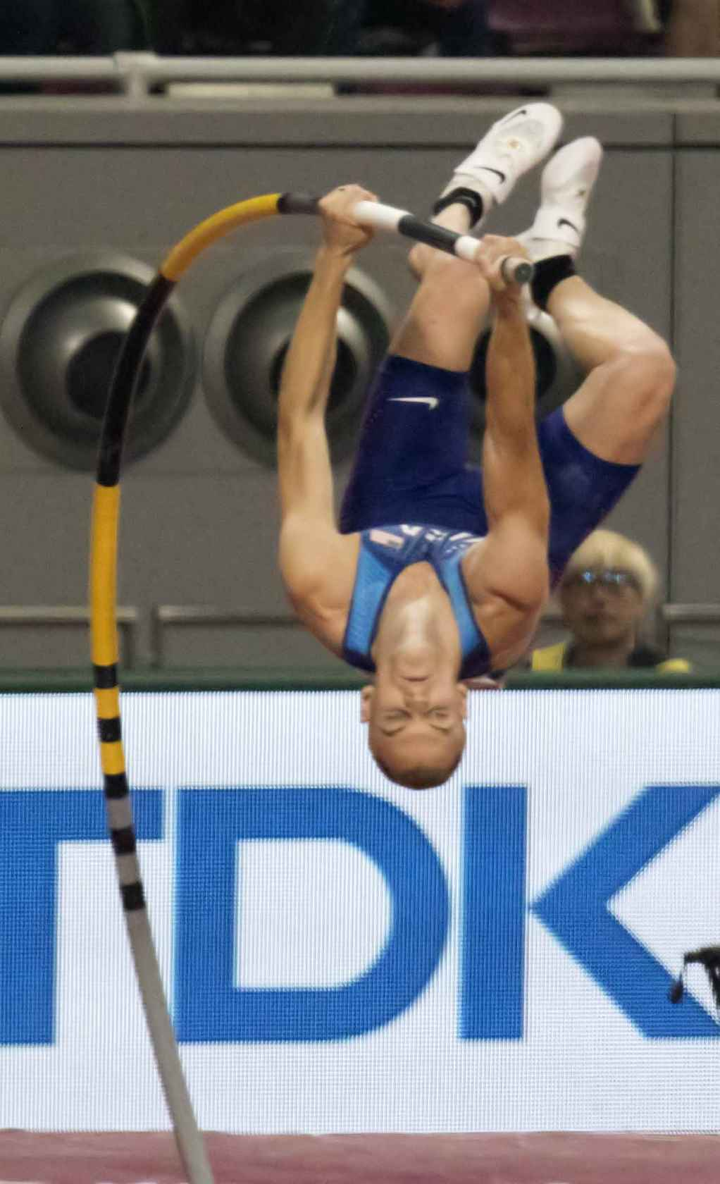 DOH50236 polevault men final kendricks